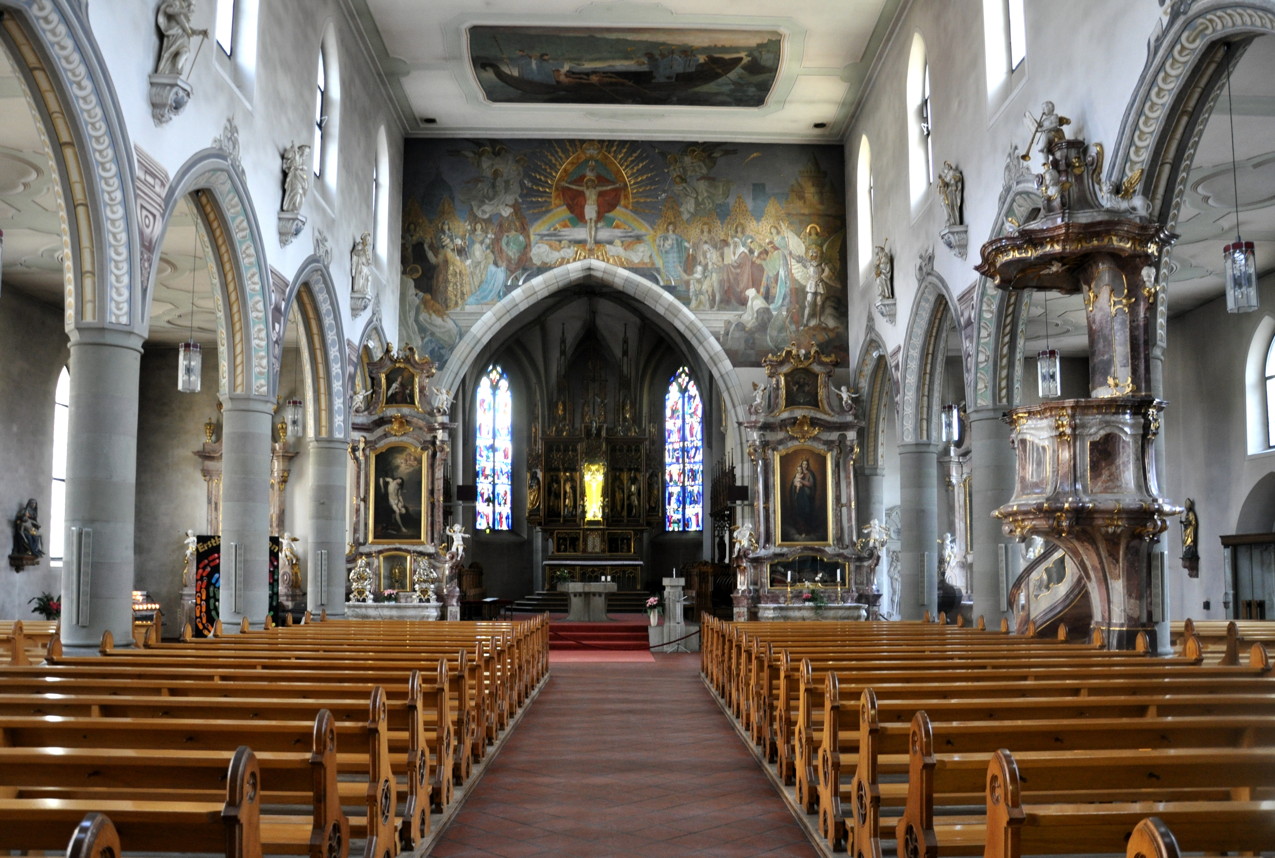 Wangen im Allgäu, Kath. Pfarrkirche St. Martinus Blick zum Chor